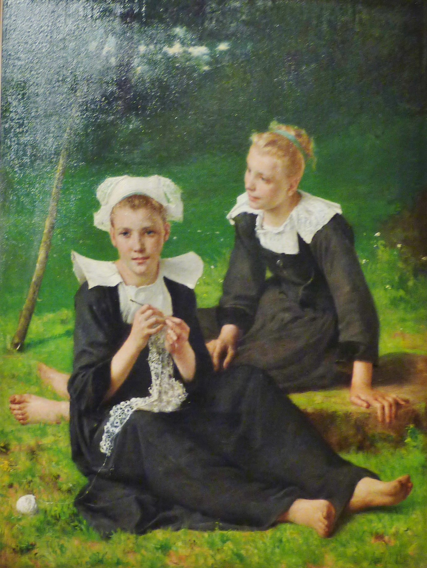 Jeunes dentellières de Beuzec-Conq près Concarneau, (mode du pays de Rosporden-Fouesnant)